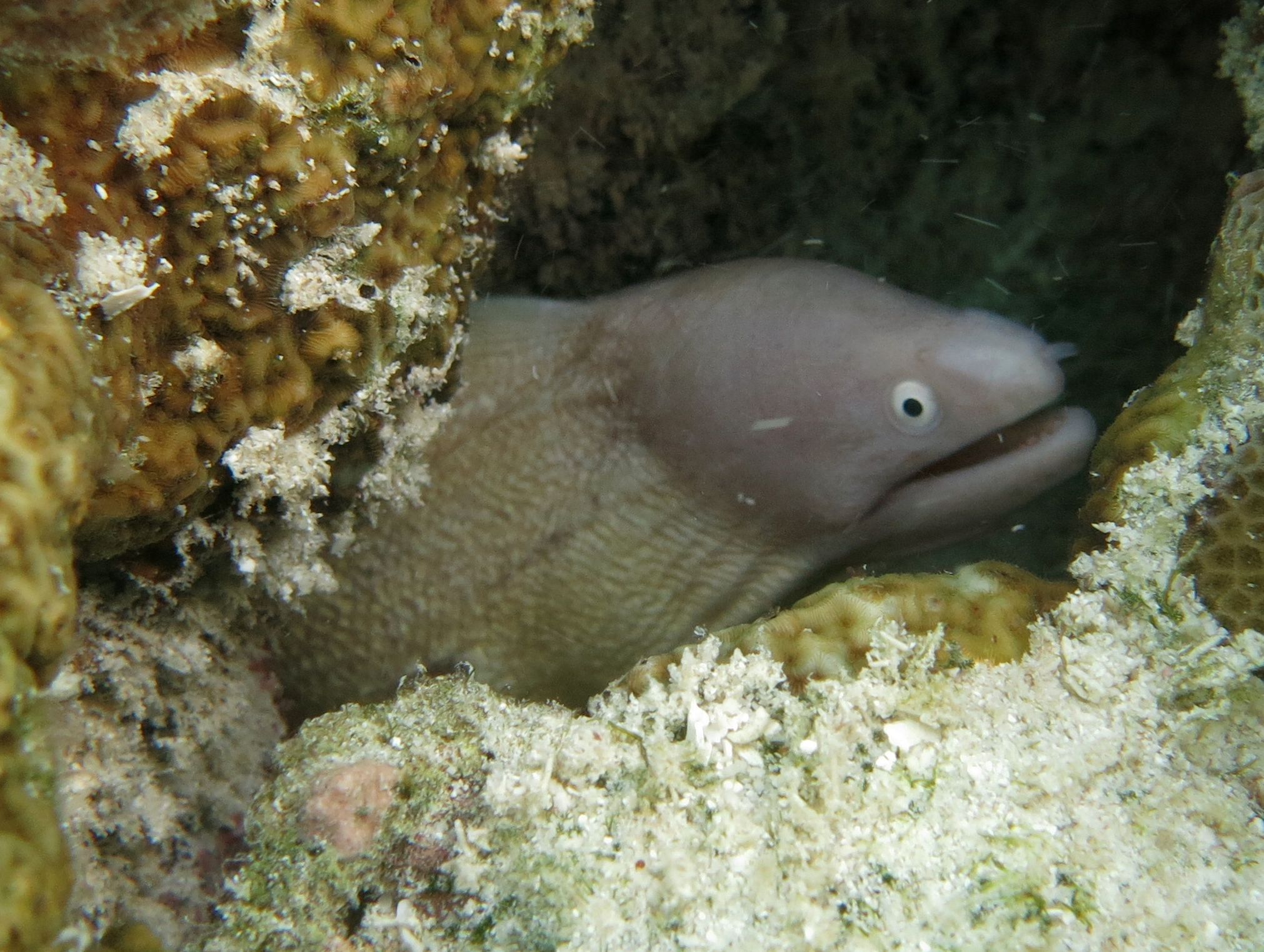 Une murène à œil blanc (Gymnothorax thyrsoideus) aux Maldives (Landaagiraavaru, atoll de Baa).